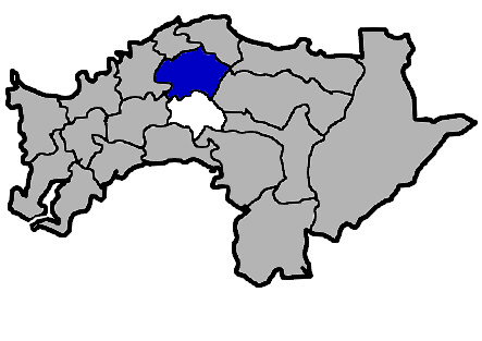 KaurJmeb於2005年2月10日為編輯嘉義縣民雄鄉所繪